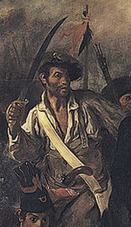 Zoom al barret dels estudiants de l'escola politècnica, que no s'ha de confondre amb els dels militars, ja que estàven contra els monàrquics a la revolució de Julioll.